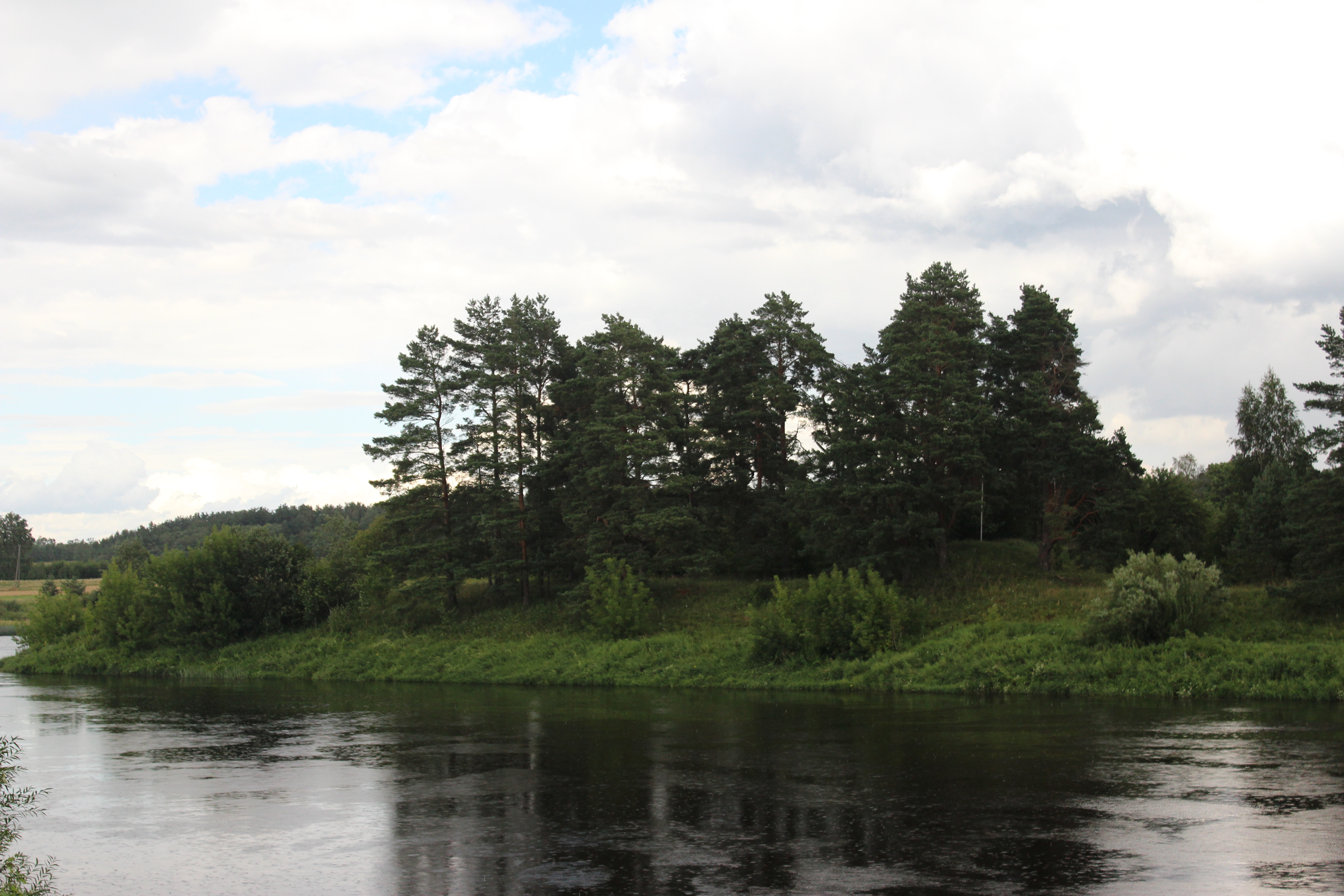 Kaupres pilskalns, Ābeļu pagasts